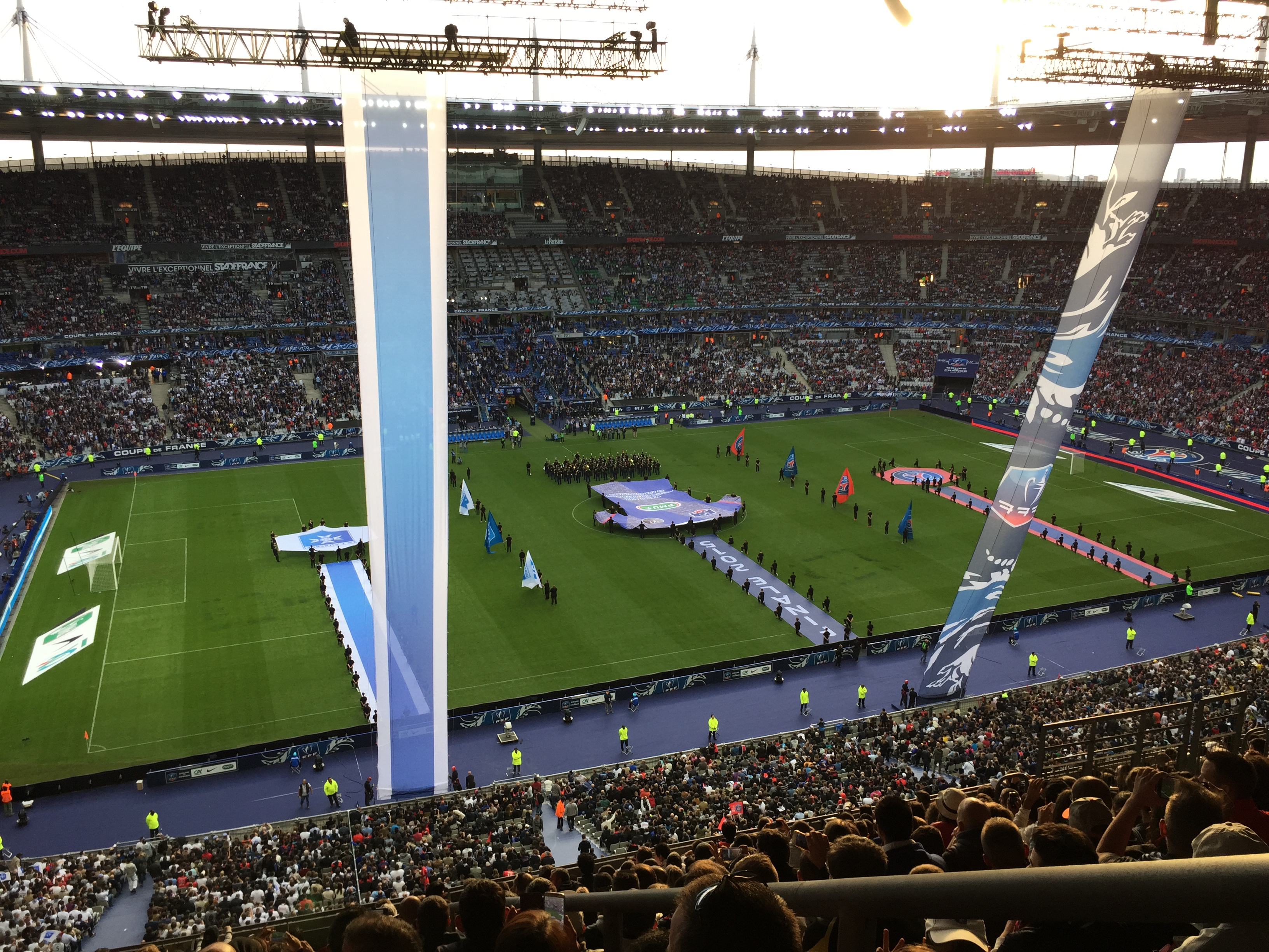 Finale de la coupe de France de football 2014-2015.